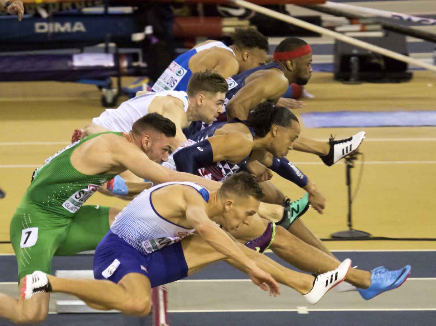 EKI30086 halve finale 60mH martinot lagarde